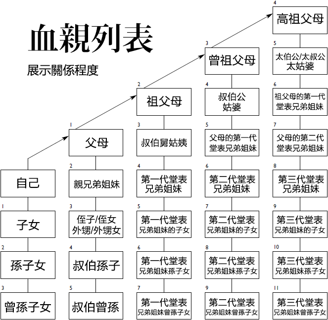 展示关系程度的血亲列表（繁体中文）